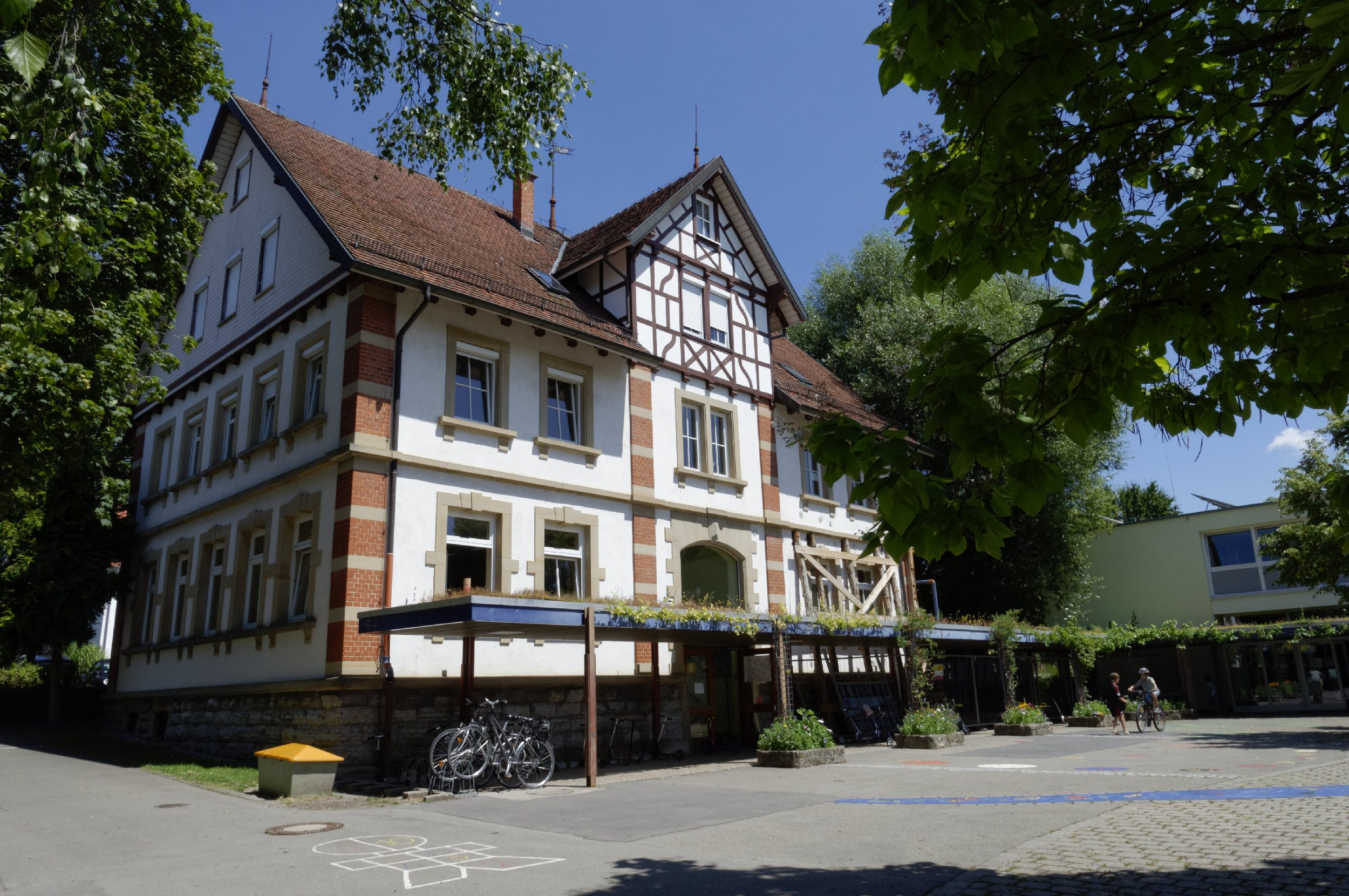 Bilder aus Wurmlingen 2016